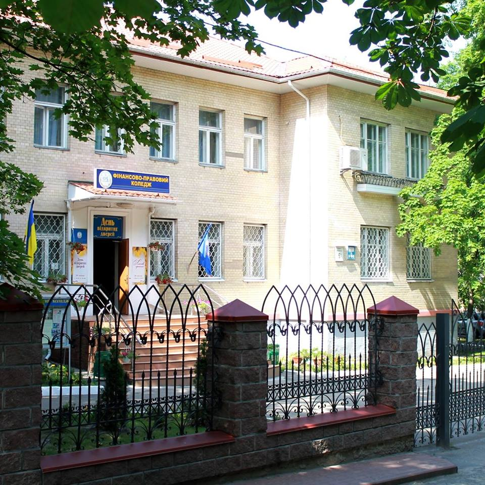 Фотографія фасаду ПВНЗ "фінансово-правовий коледж"